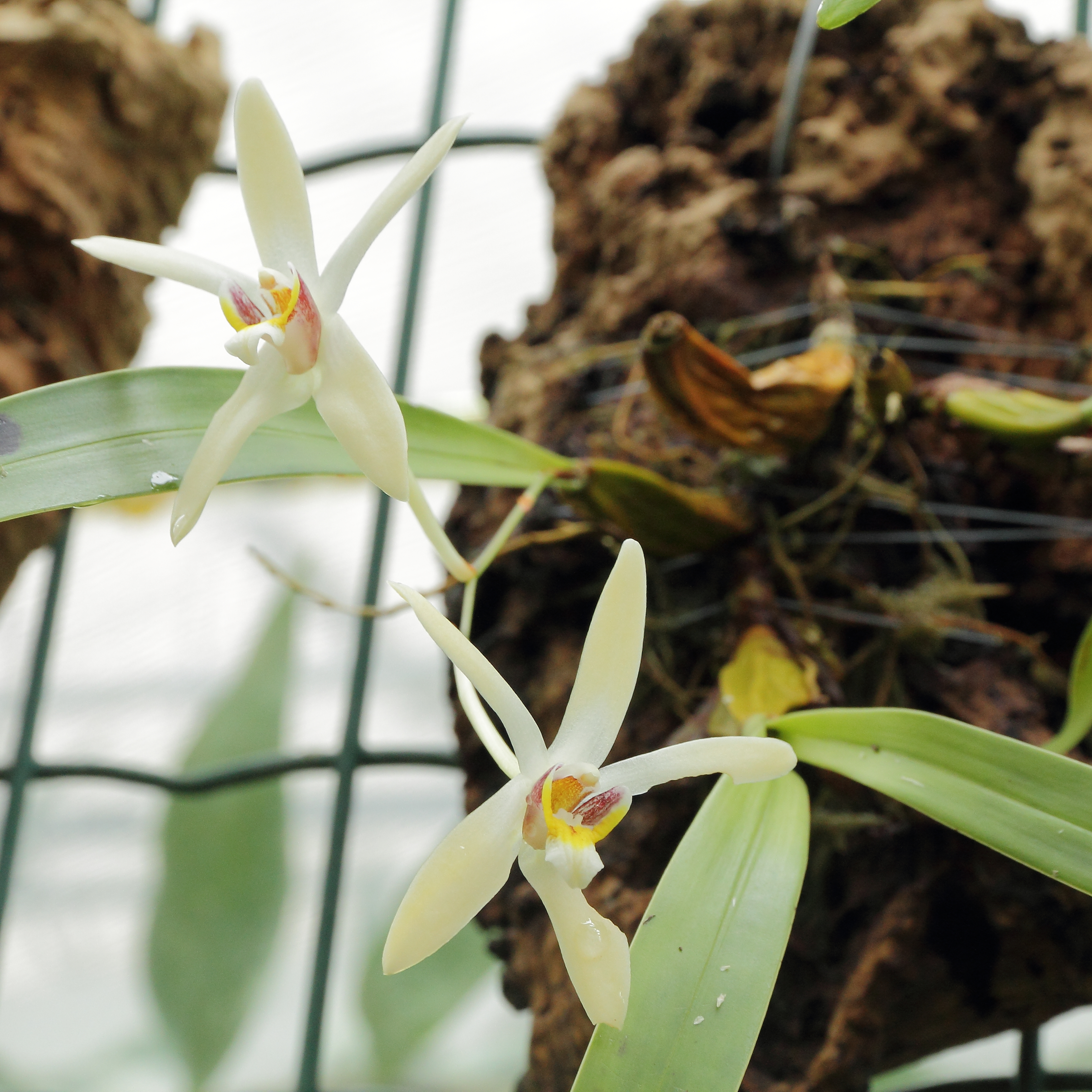 Epigeneium triflorum i Göteborgs Botaniska Trädgård.